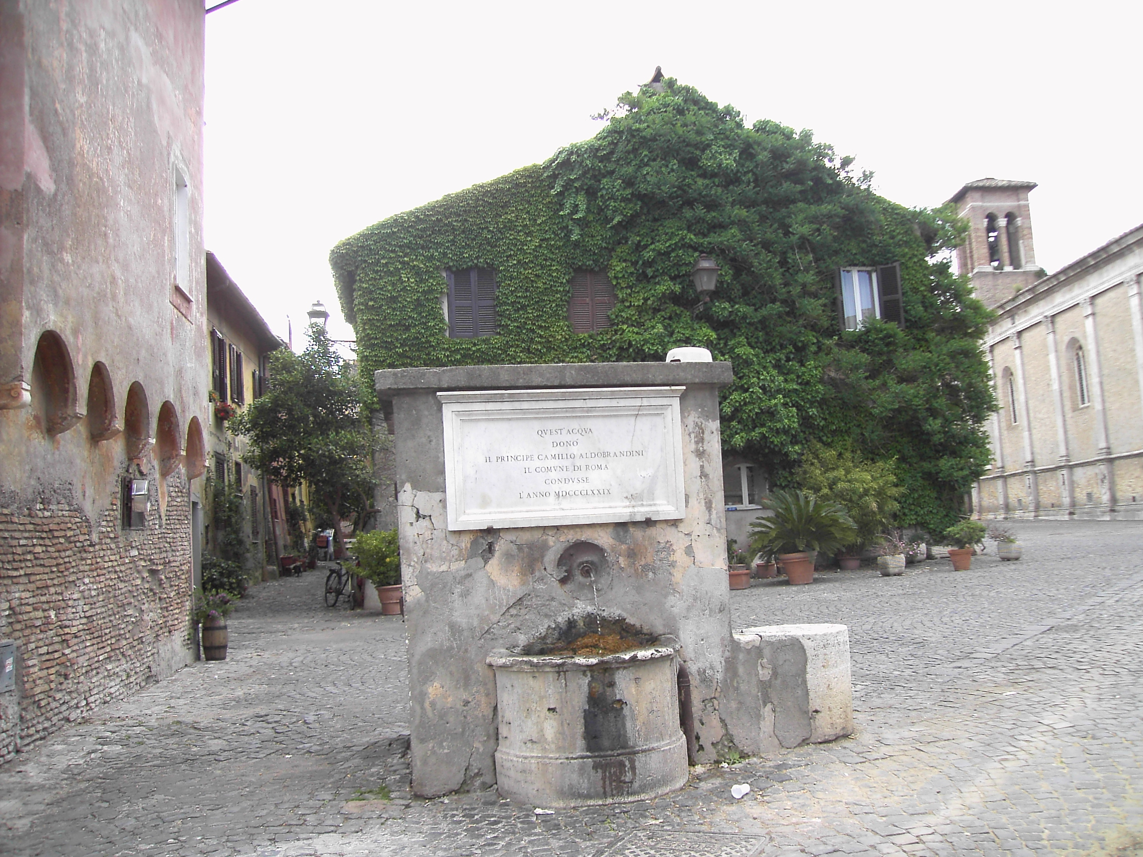 Roma , borgo di Ostia antica: la piazzetta con la fontana